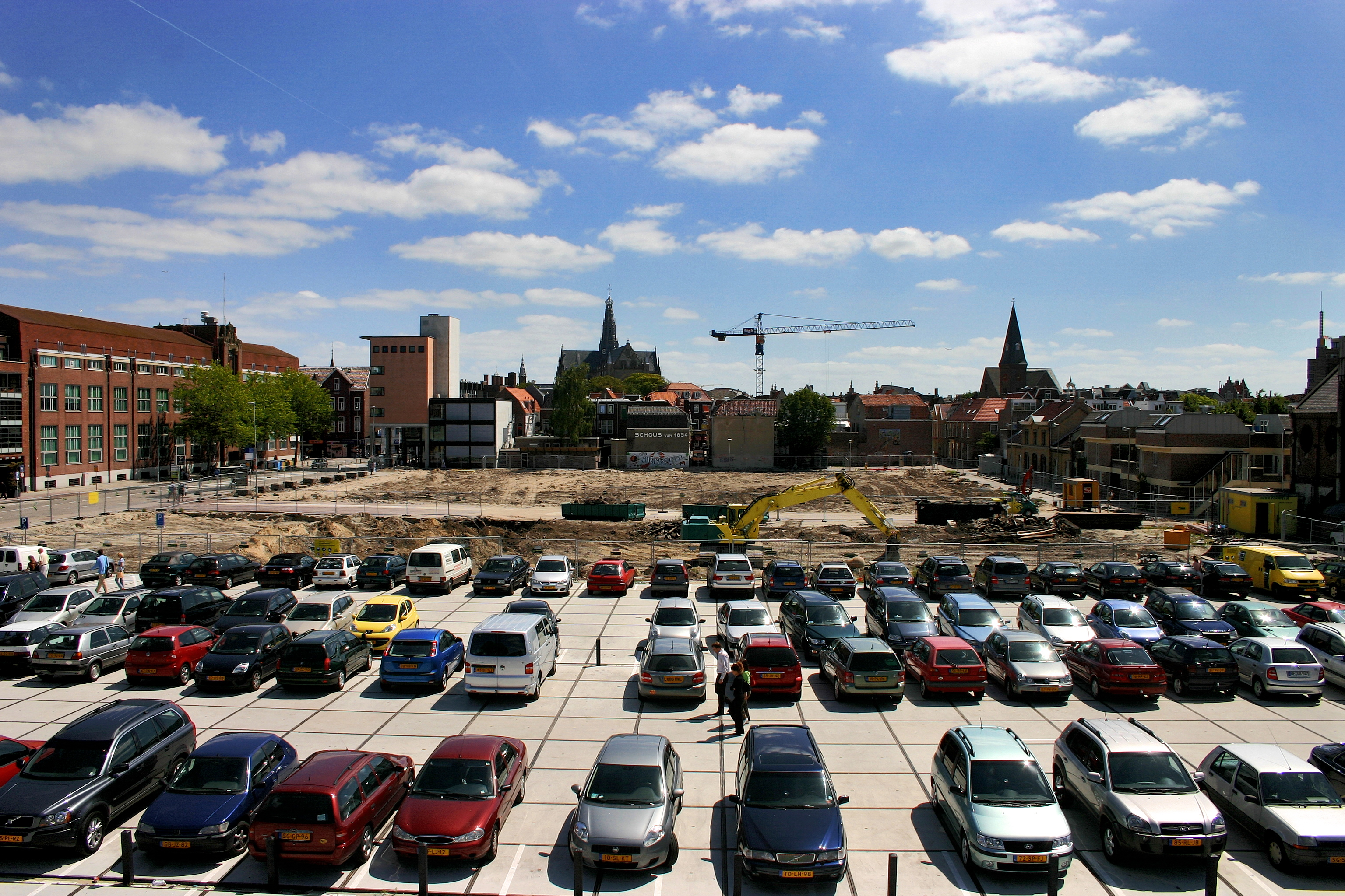 Overzicht van wat nog een parkeerplaats gaat worden met daarboven leisure en appartementen.